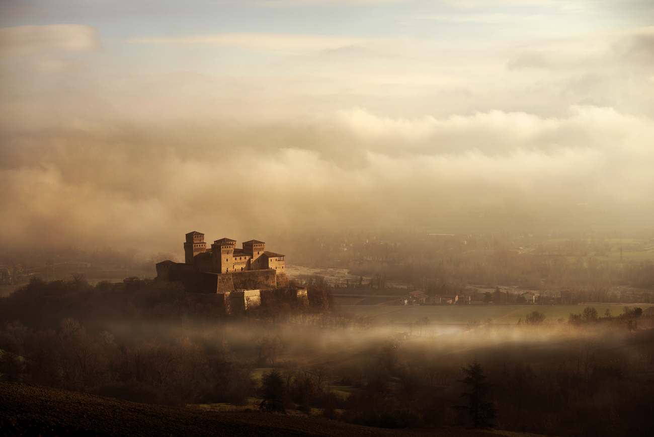 Castello di Torrechiara - MIBAC This is a photo of a monument which is part of cultural heritage of Italy.